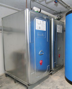 doppelwandiger, stahlblechummantelter Batterietank